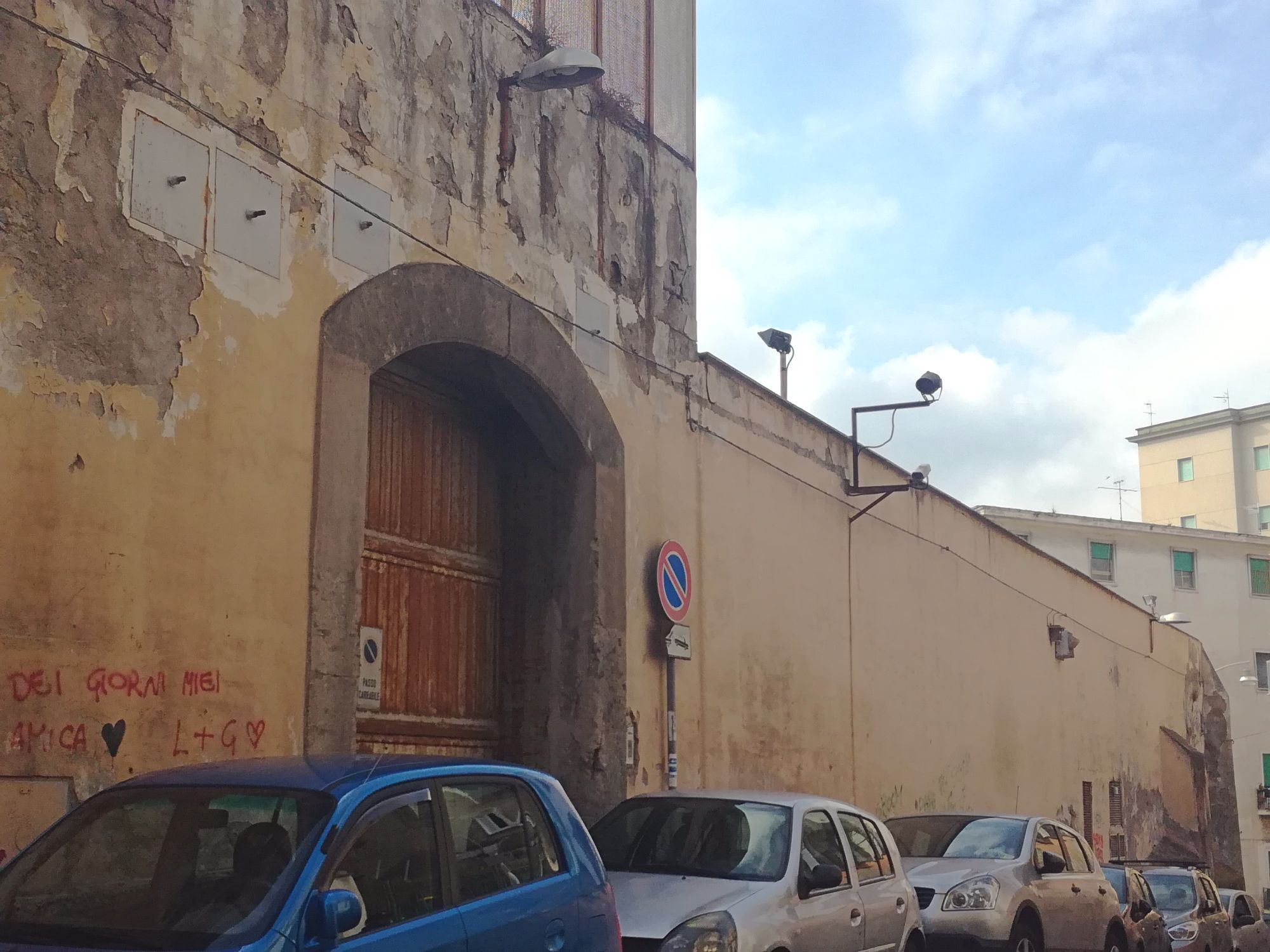 Monastero di Sant'Eframo Nuovo (Napoli)